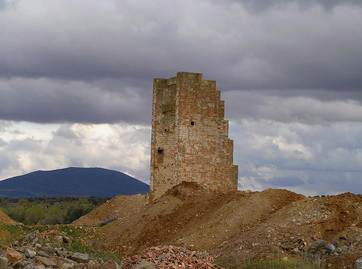 Castillete de la mina de grafito de Guadamur (Toledo).